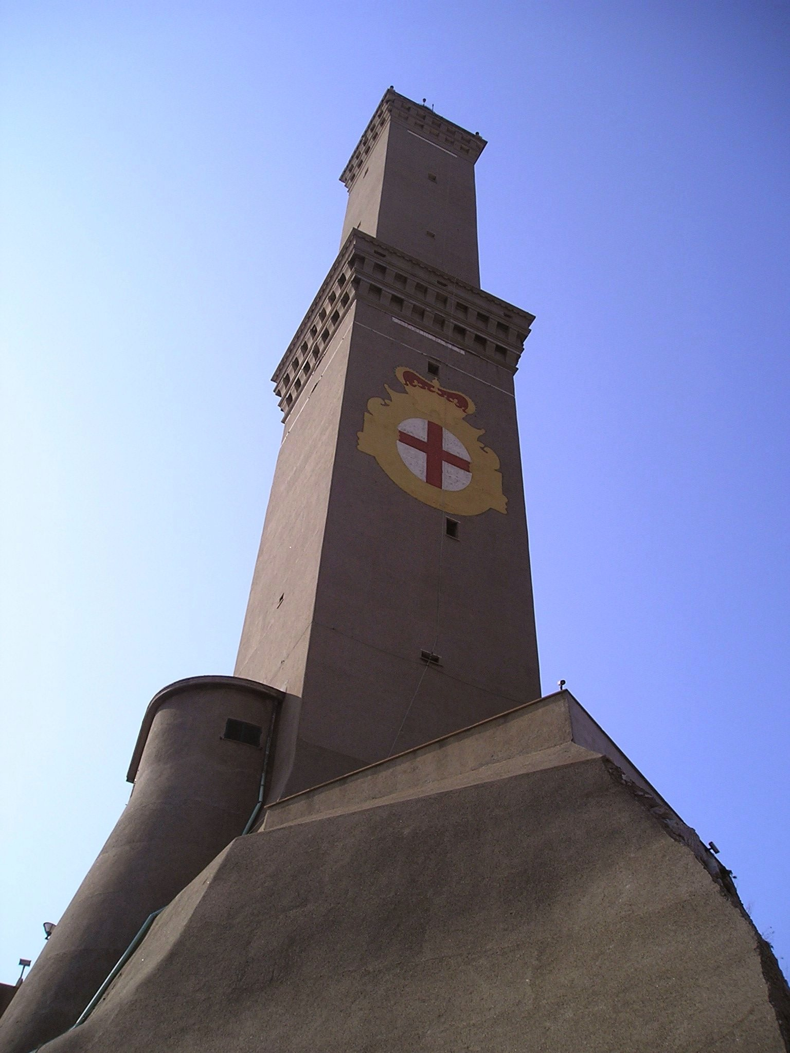 La torre della Lanterna di Genova, faro e simbolo della città, vista dalla base - OpenStreetMap(Info)